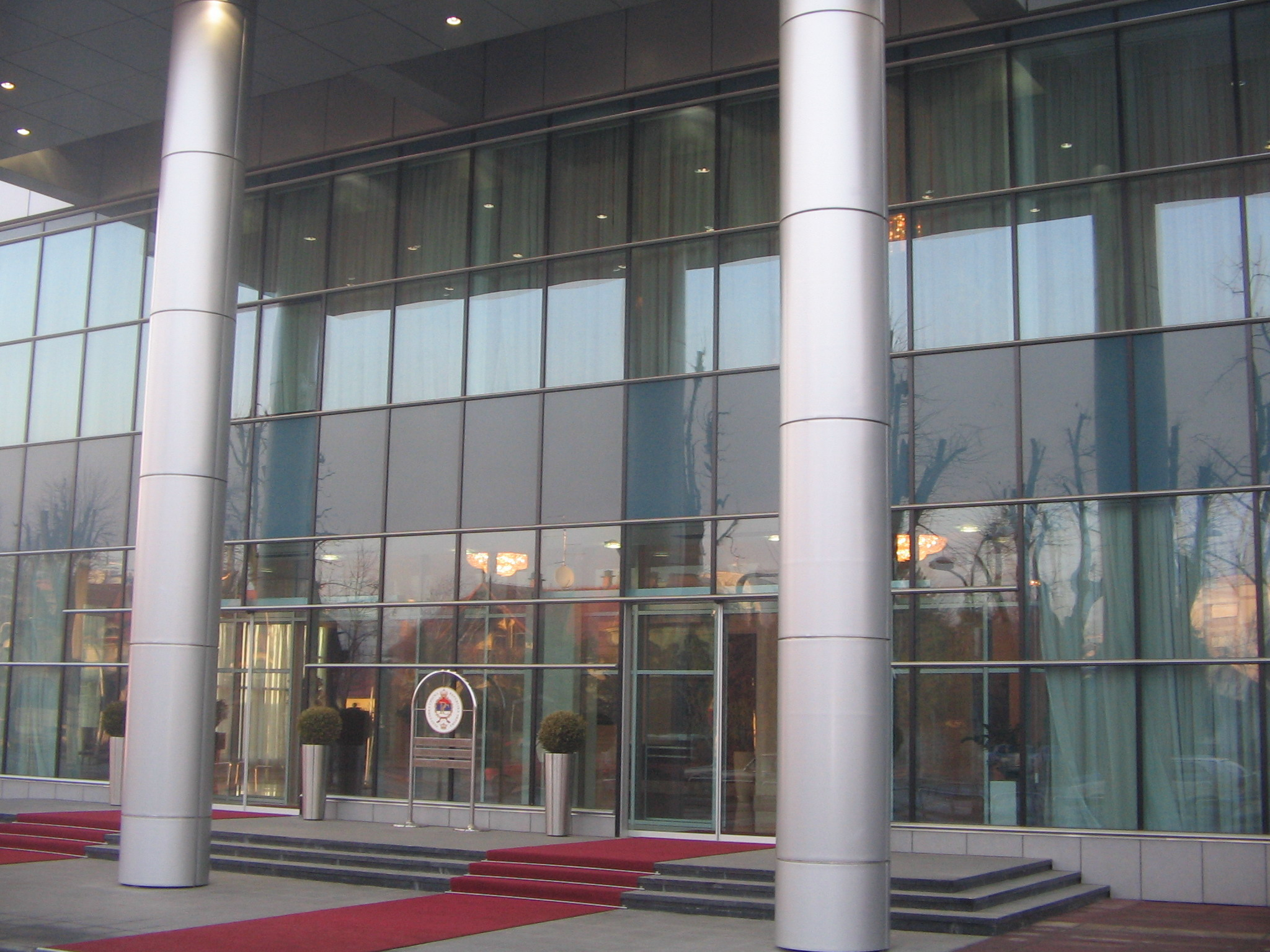 Ulaz u zgradu Vlade Republike Srpske u Banjoj Luci.